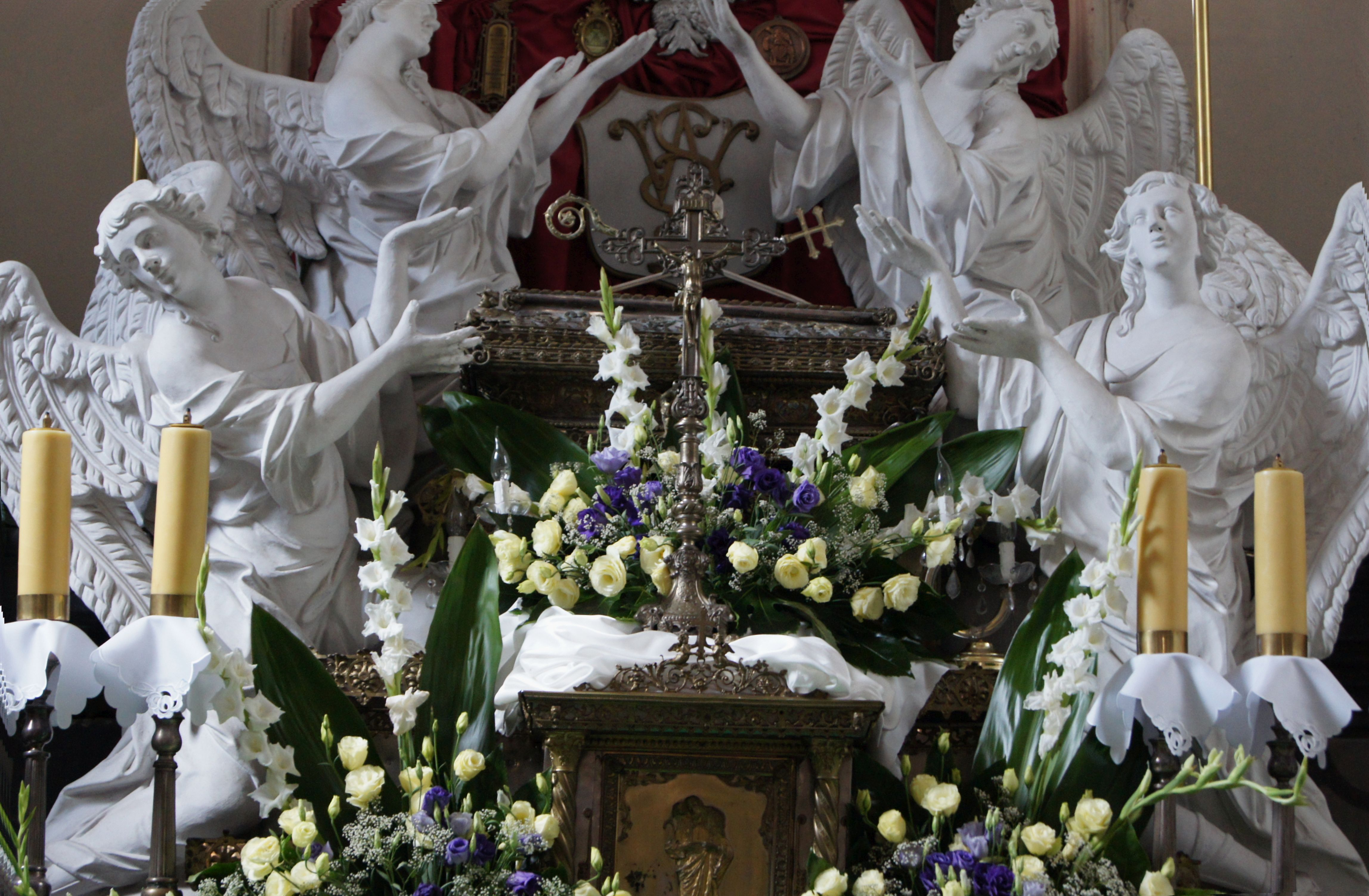 Cistercian Abbey in Jędrzejów Native nameArchiopactwo Cystersów w JędrzejowieLocationJędrzejówCoordinates50° 39′ 13″ N, 20° 17′ 04″ E Established1140Authority control : Q1775407 Trumna ze szczątkami Wincentego Kadłubka w kościele klasztornym